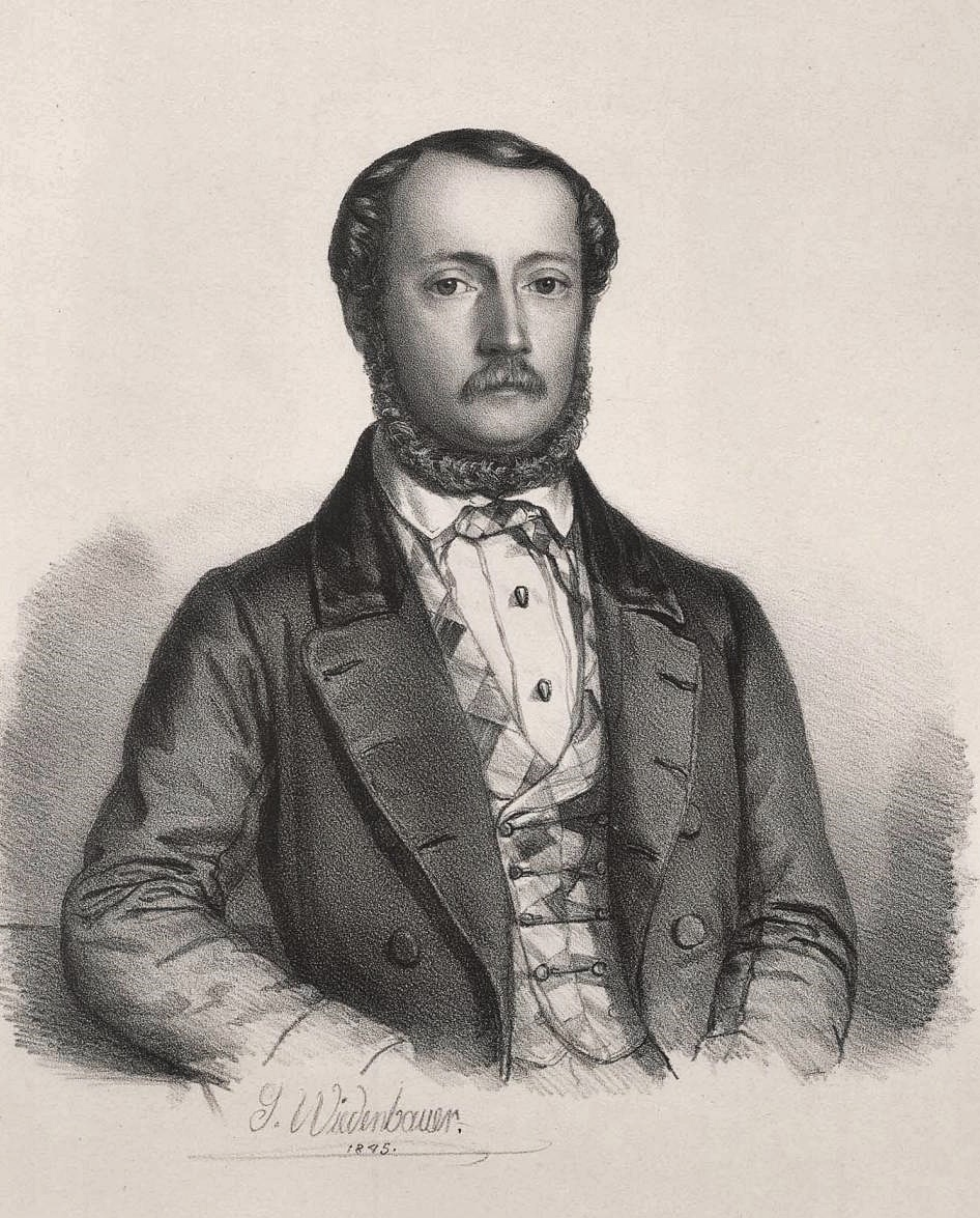 Maximilian von Seinsheim-Grünbach (1811-1885), Reichsstagsabgeordneter Zentrum